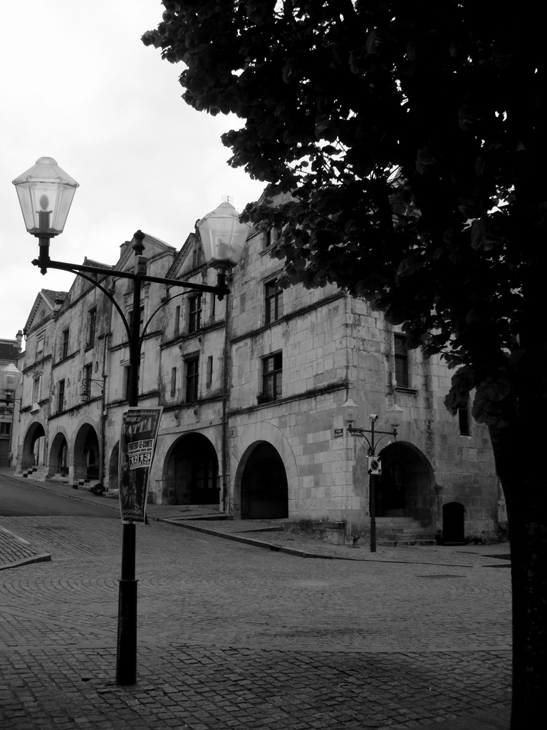 Rue dans Fontenay le comte Vendée (85) / Street in Fontenay-le-Comte